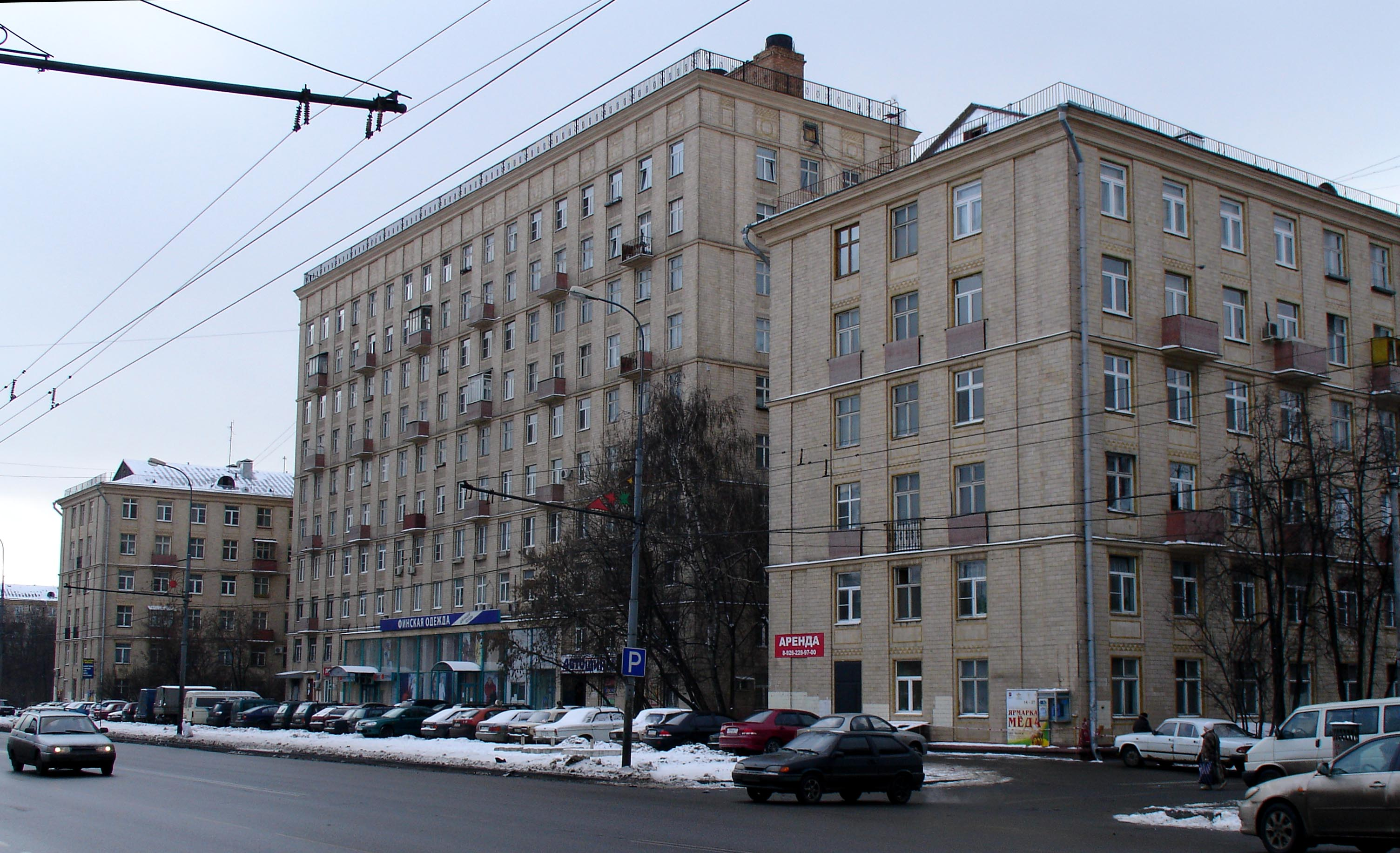 1948 Lagutenko-Posokhin buildings, Kuusinena Street, Moscow